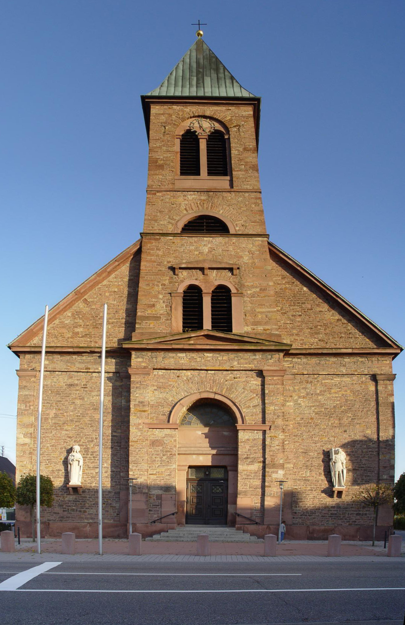 Fotografiert von Martin Dürrschnabel Kirche St. Dionys in Durmersheim, Deutschland.